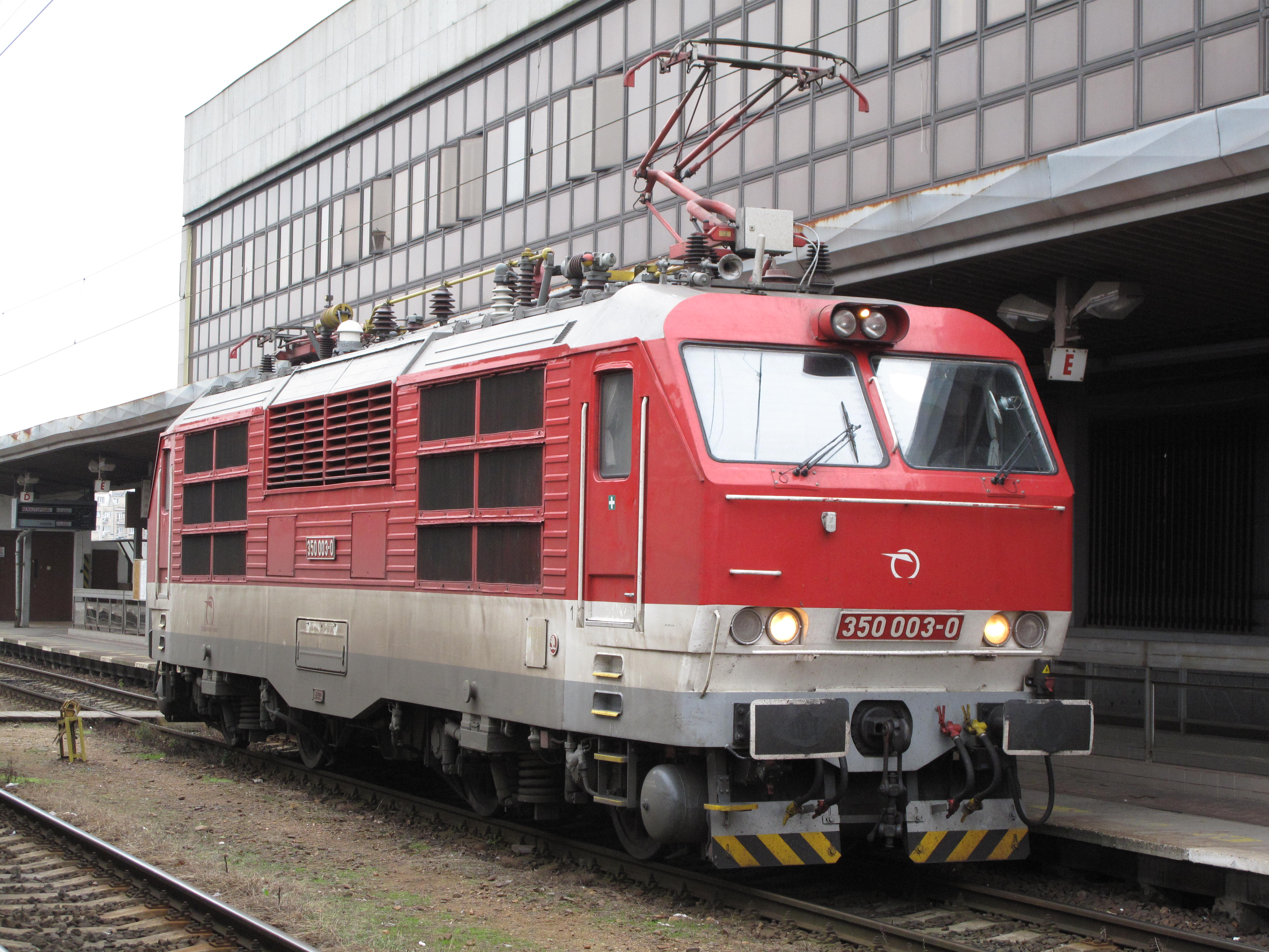 Lokomotiva 350 v Holešovicích